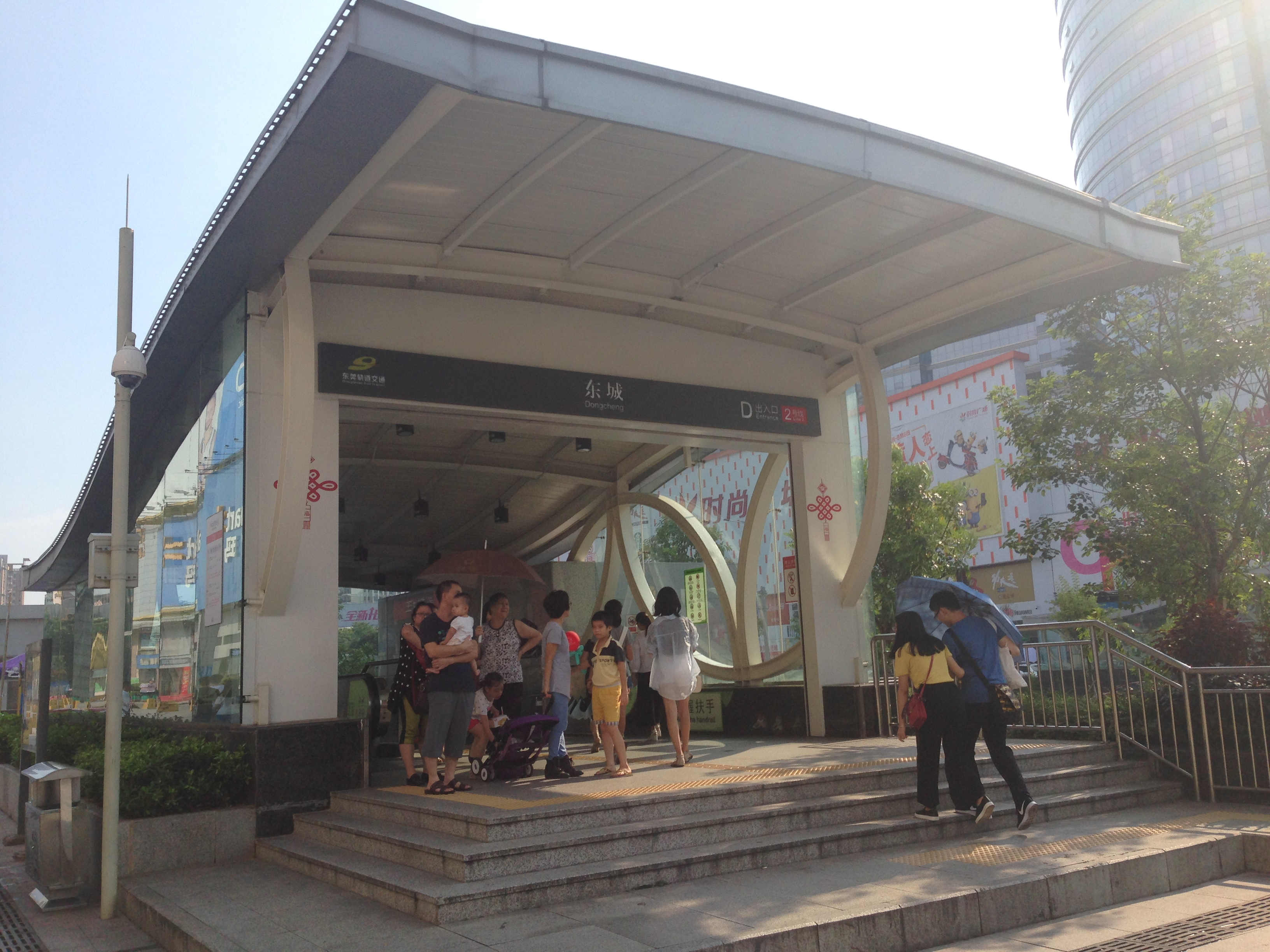 东莞轨道交通东城站D出入口